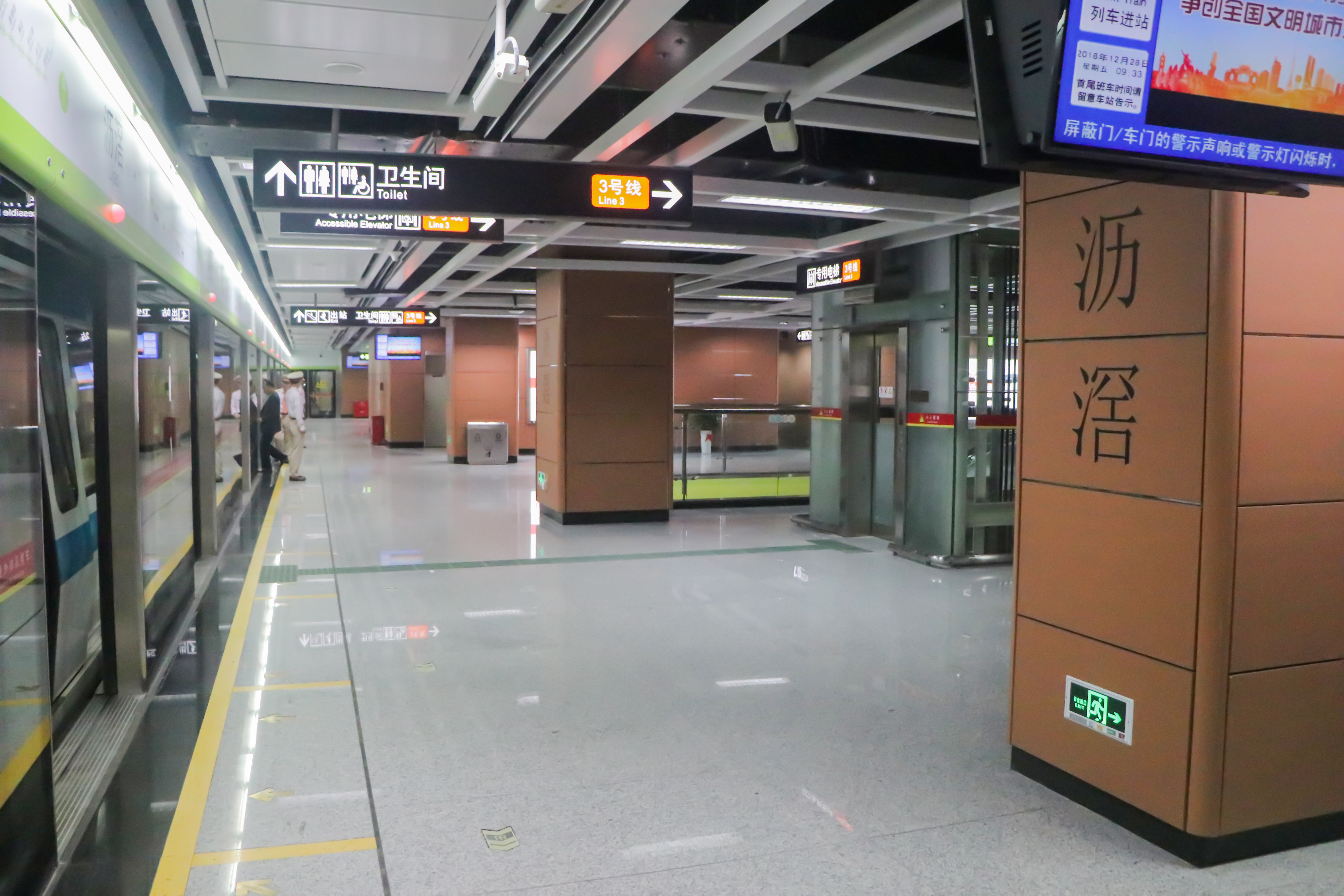 广州地铁沥滘站